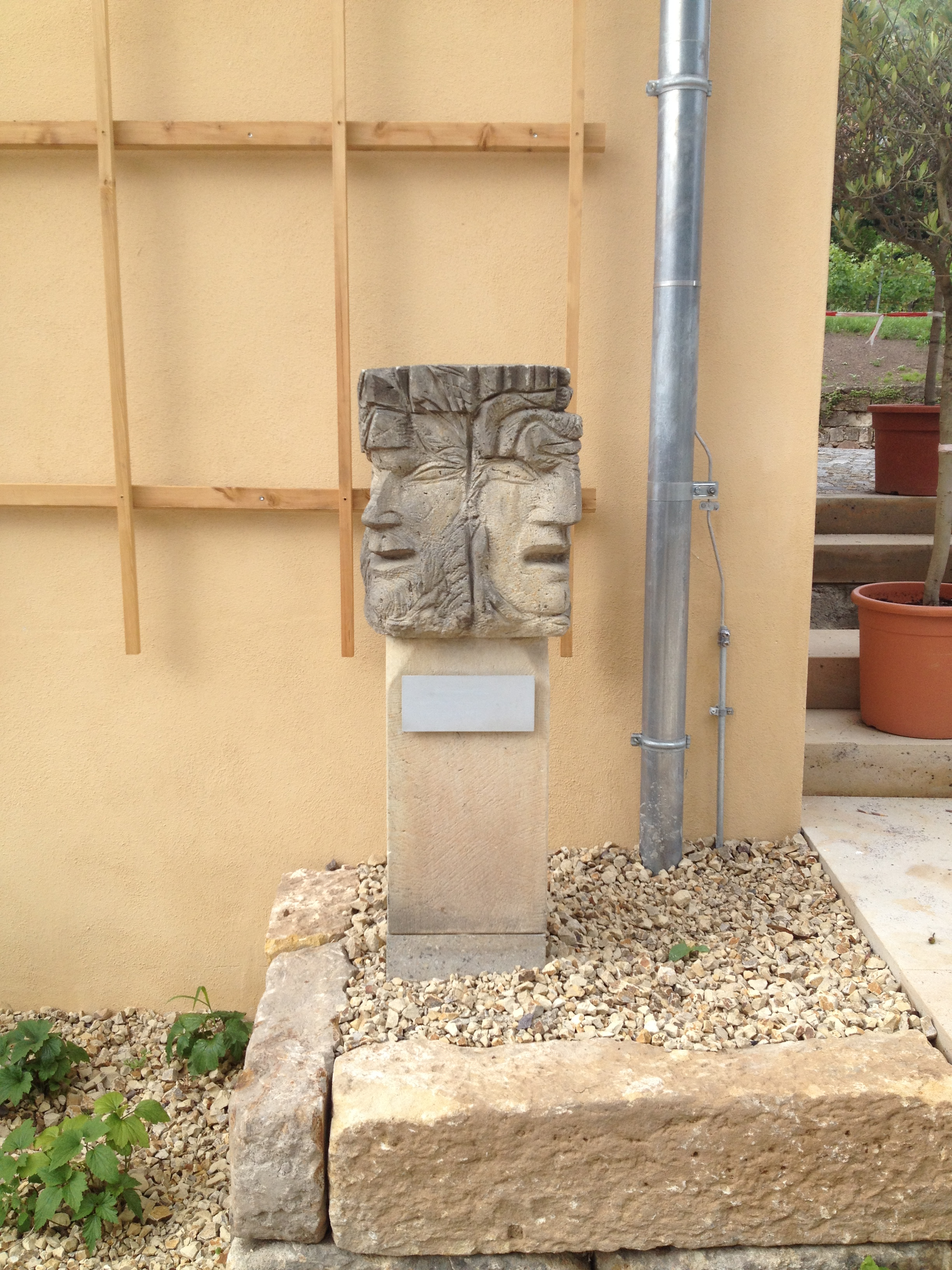 Radebeul, Hoflößnitz, Reinemer: Bacchus und Medusa